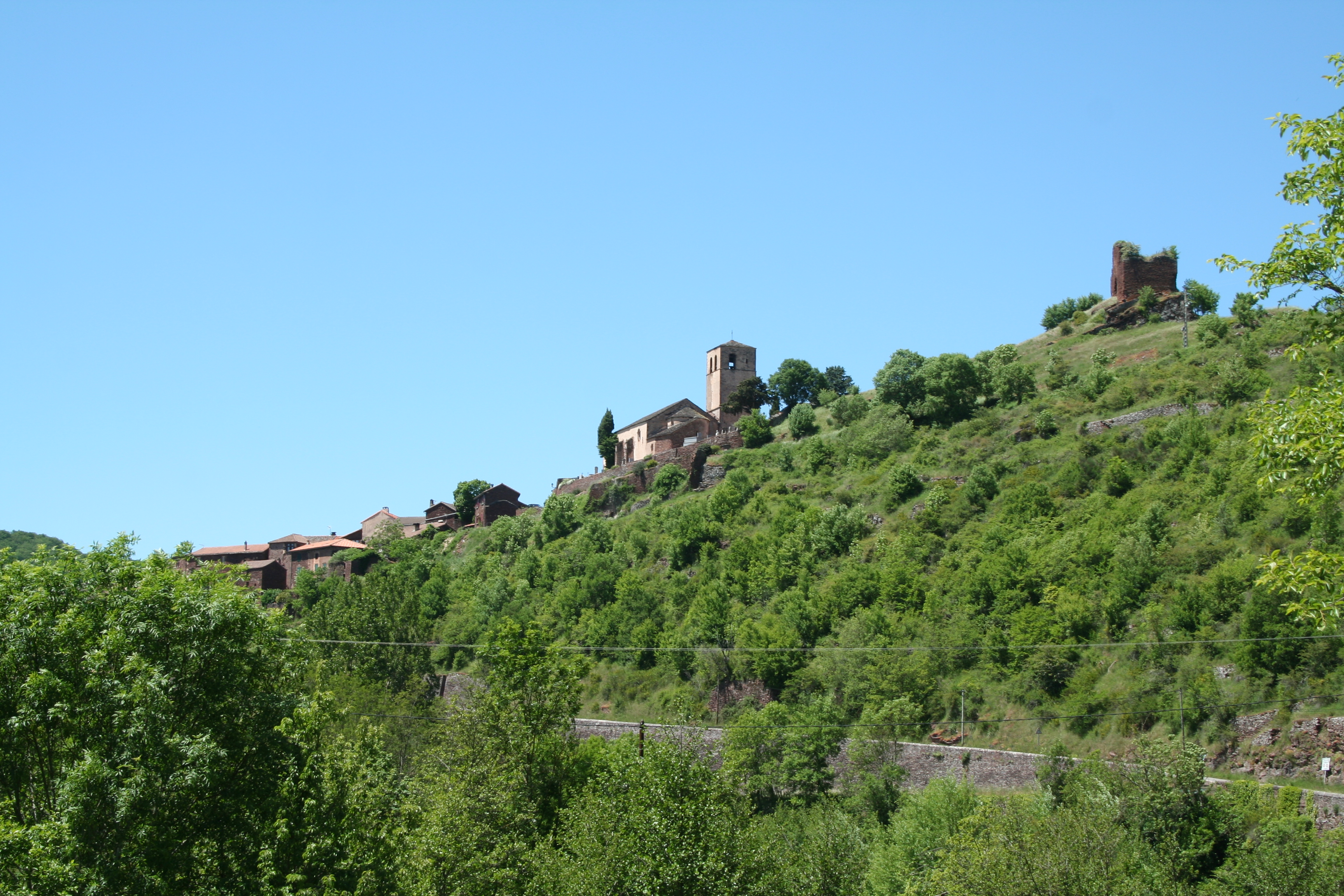 Combret (Aveyron) - vue générale